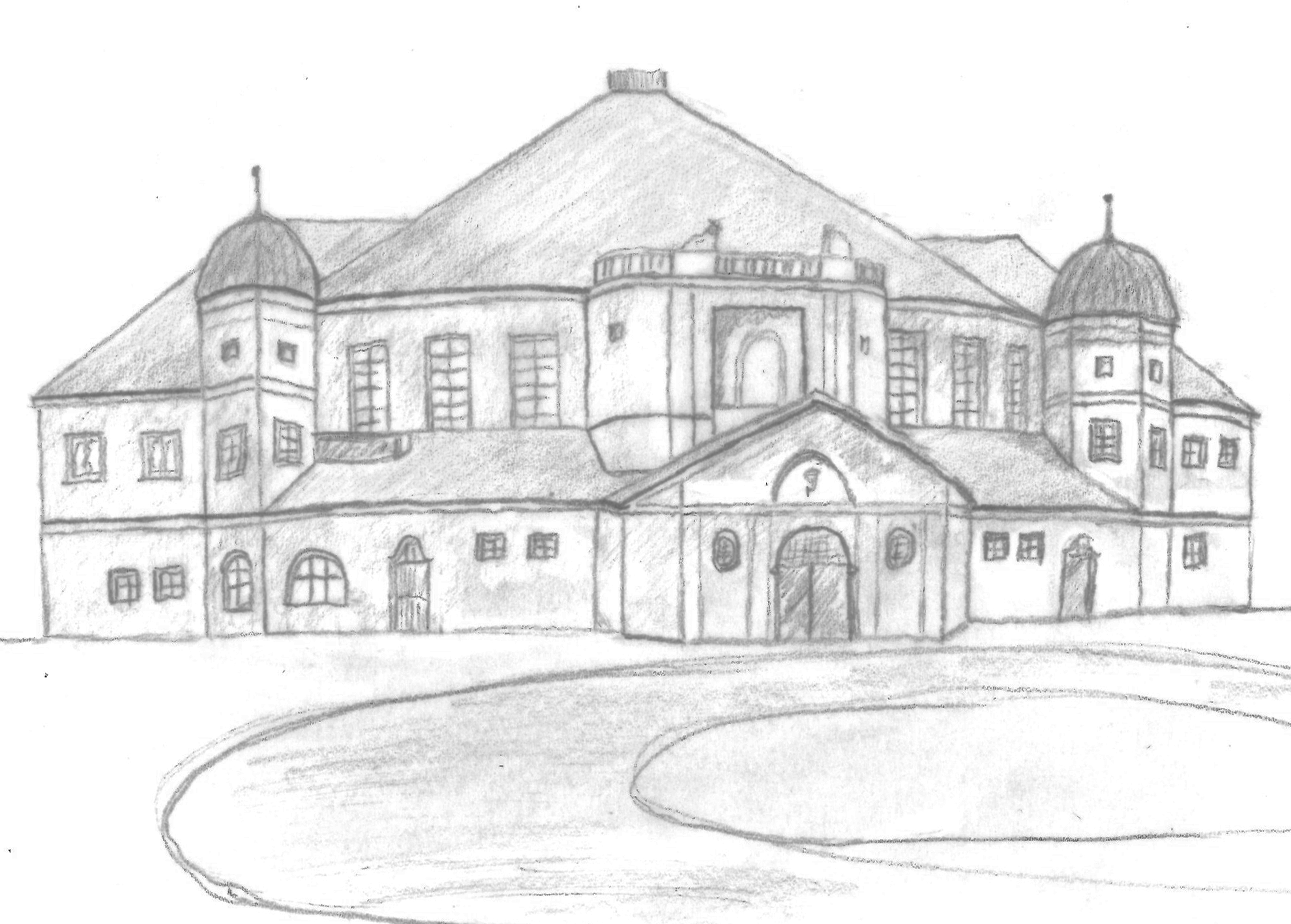 Skizze des Ludwigsbaus in (1914 bis 1965)